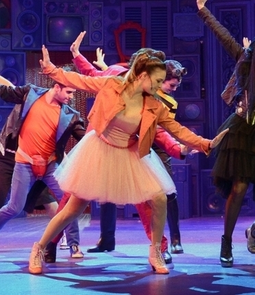 Se presenta en el Teatro de la Ribera (Av. Pedro de Mendoza 1821) la obra de teatro musical para grandes y chicos de Luis Borda, con dirección de Ricky Pashkus.Es un espectáculo de teatro musical para grandes y chicos. Con canciones, bailes y músicos en vivo, cuenta la historia de un grupo de personajes que viven en un barrio cuyo emblema es Carlos Gardel, el amor y los sueños. En escena: Felipe Colombo, Florencia Otero, Rodolfo Valss, Mariú Fernández, Germán Tripel, Esteban Masturini, Francisco Ruiz Barlett, Pedro Velázquez, Sofía González Gil, Julieta Gonçalvez y Julián Pucheta.